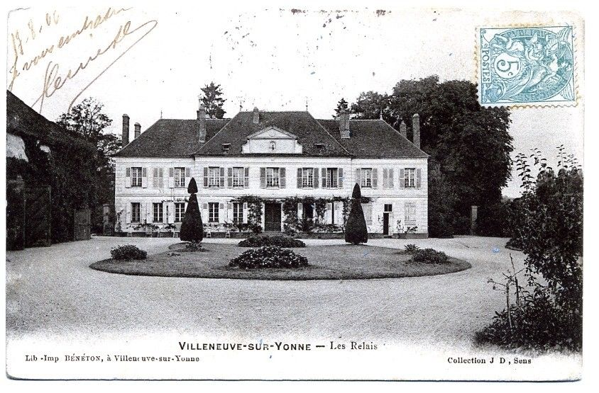 Les Relais à Villeneuve-sur-Yonne. Ancienne propriété des Natanson.